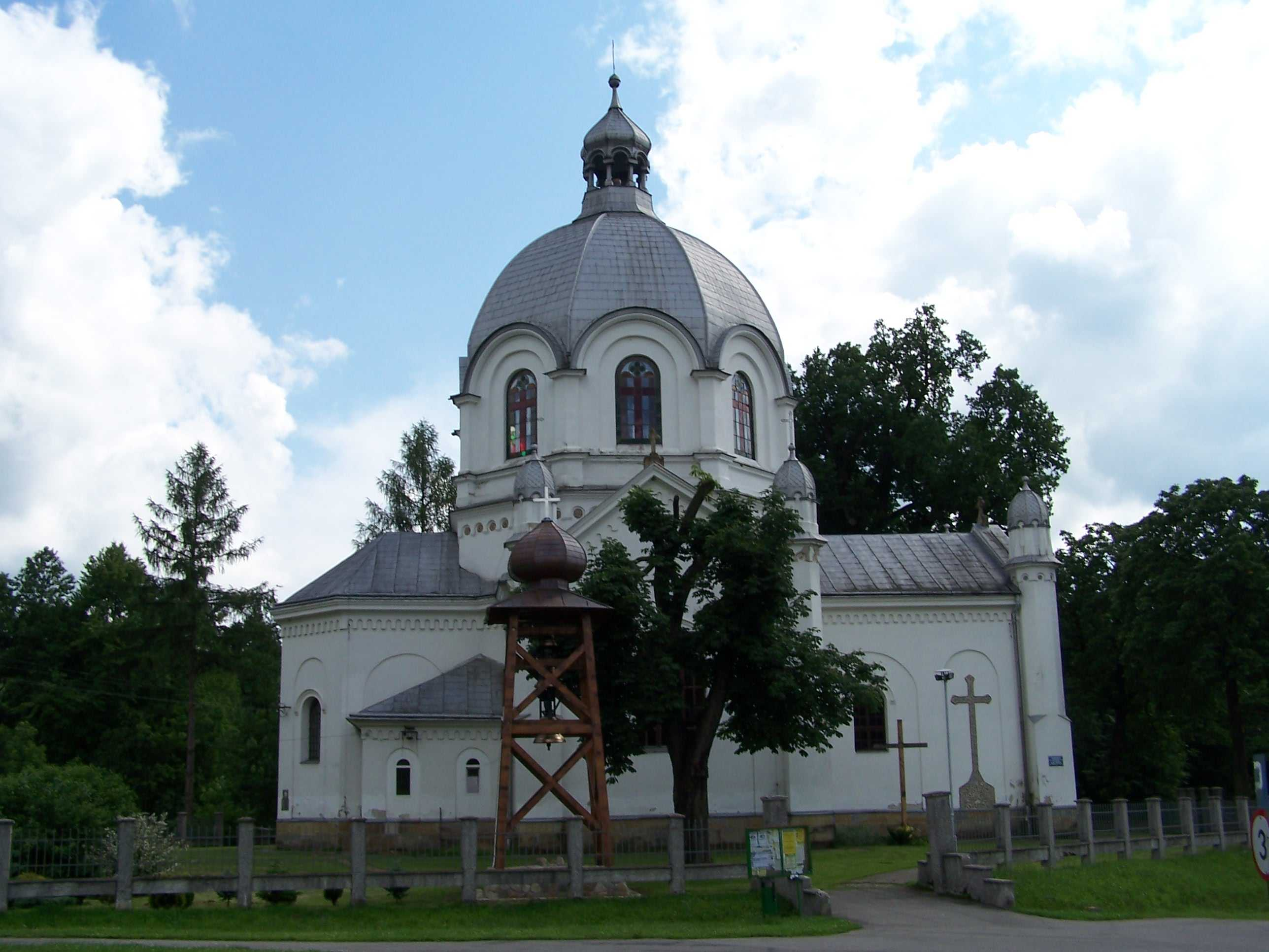 Węglówka - dawna cerkiew grecko-kat. p.w. Narodzenia NMP, ob. kościół rzym.-kat